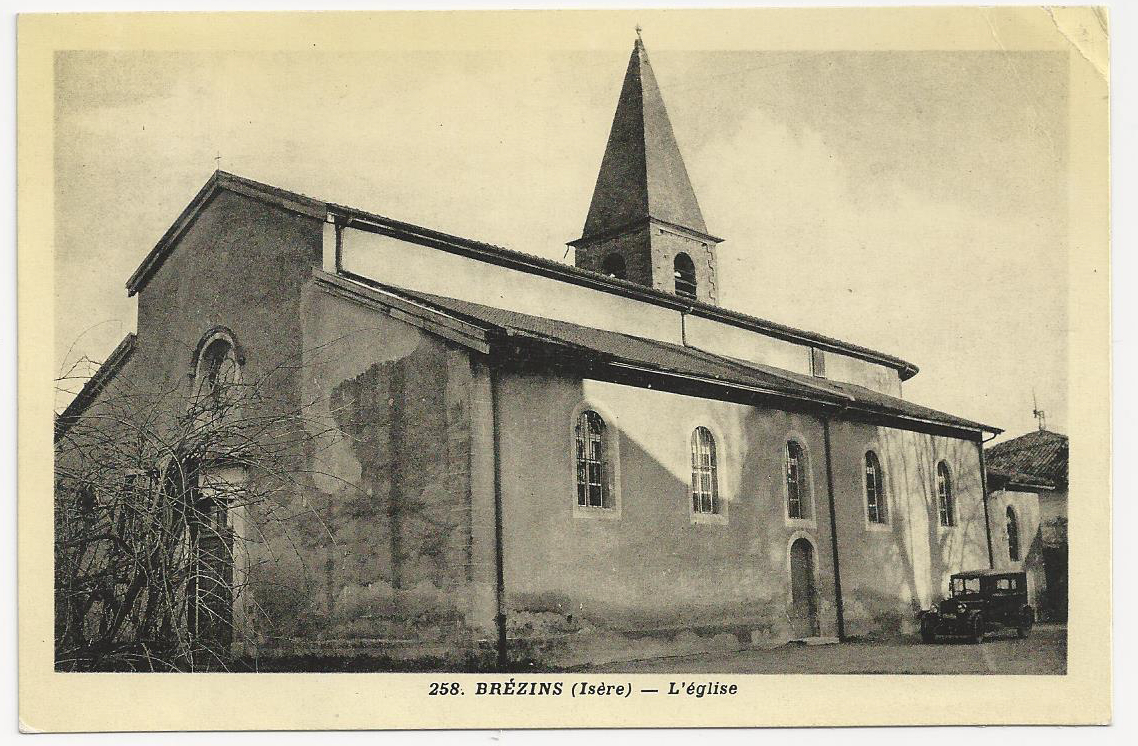 Eglise de Brézins au début du XXe siècle